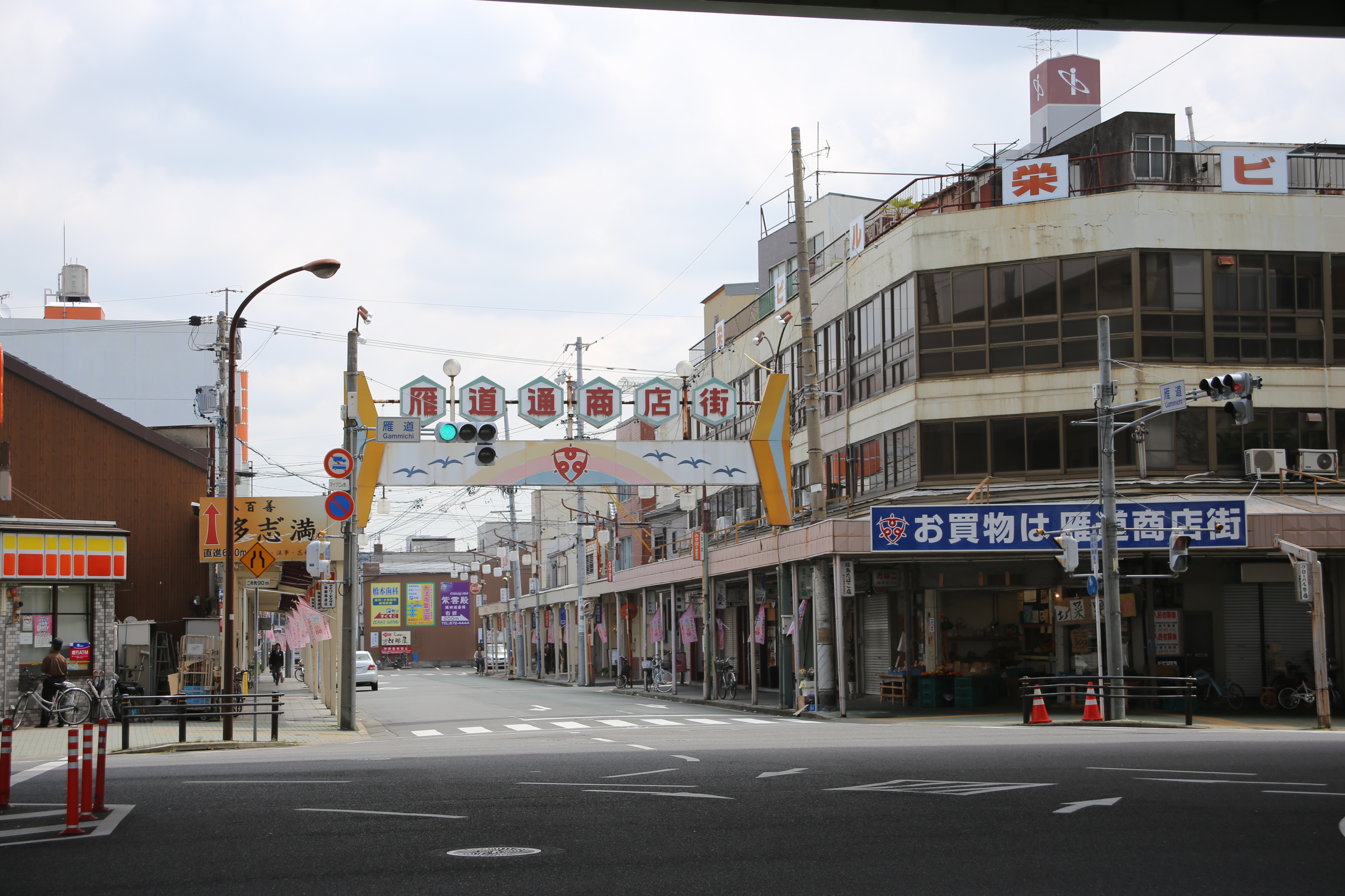 名古屋市瑞穂区の雁道通商店街を東側公道北側より撮影